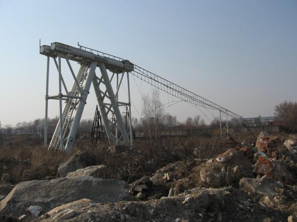 Тестовый путь прототипа струнных рельс в г. Озеры, по которому ездил модернизированный грузовой автомобиль ЗИЛ-131. С 2009 года разобран на металлолом